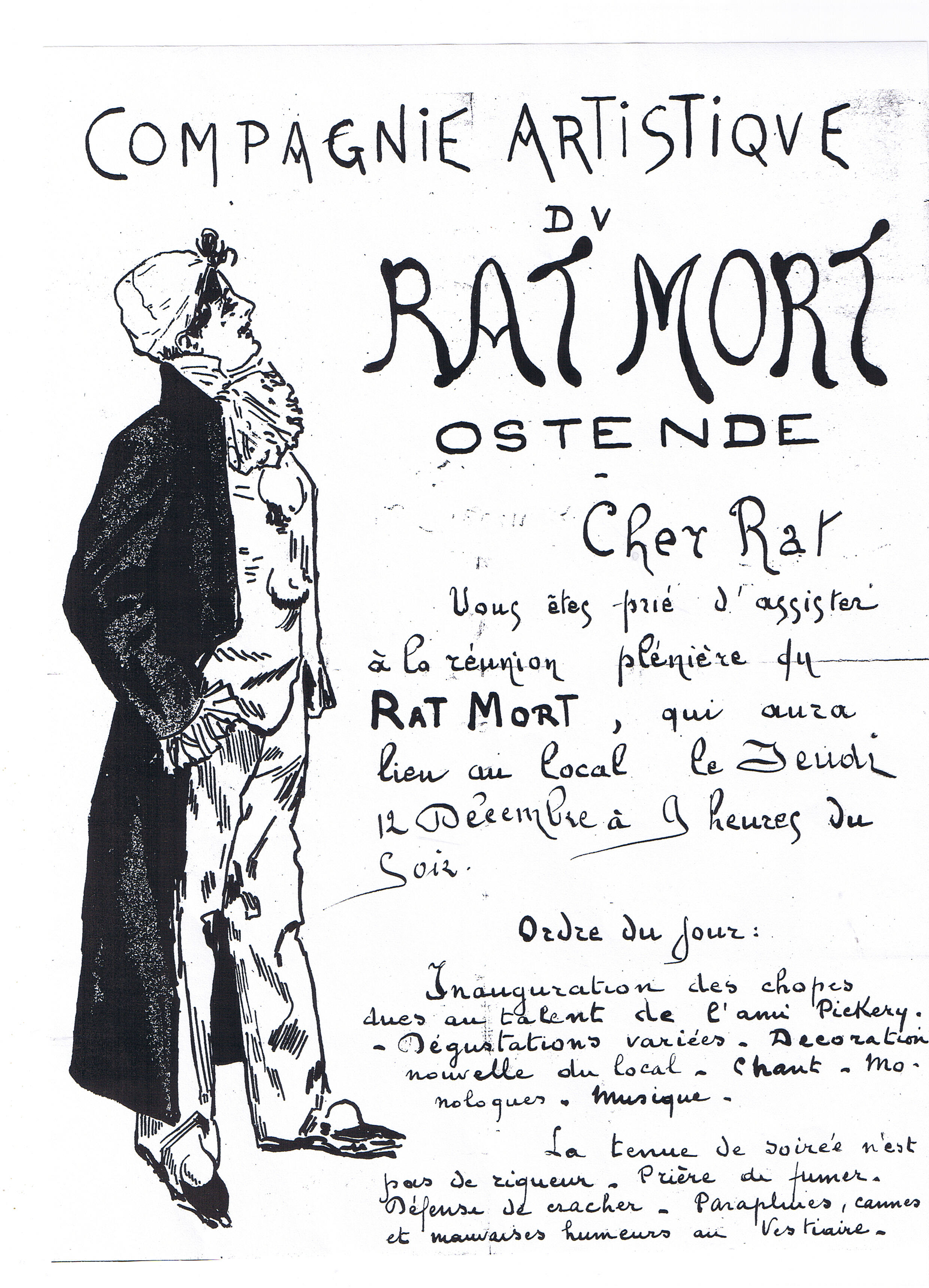 Un gentilhomme invite ses "rats" - dessin à l'encre noir et blanc.